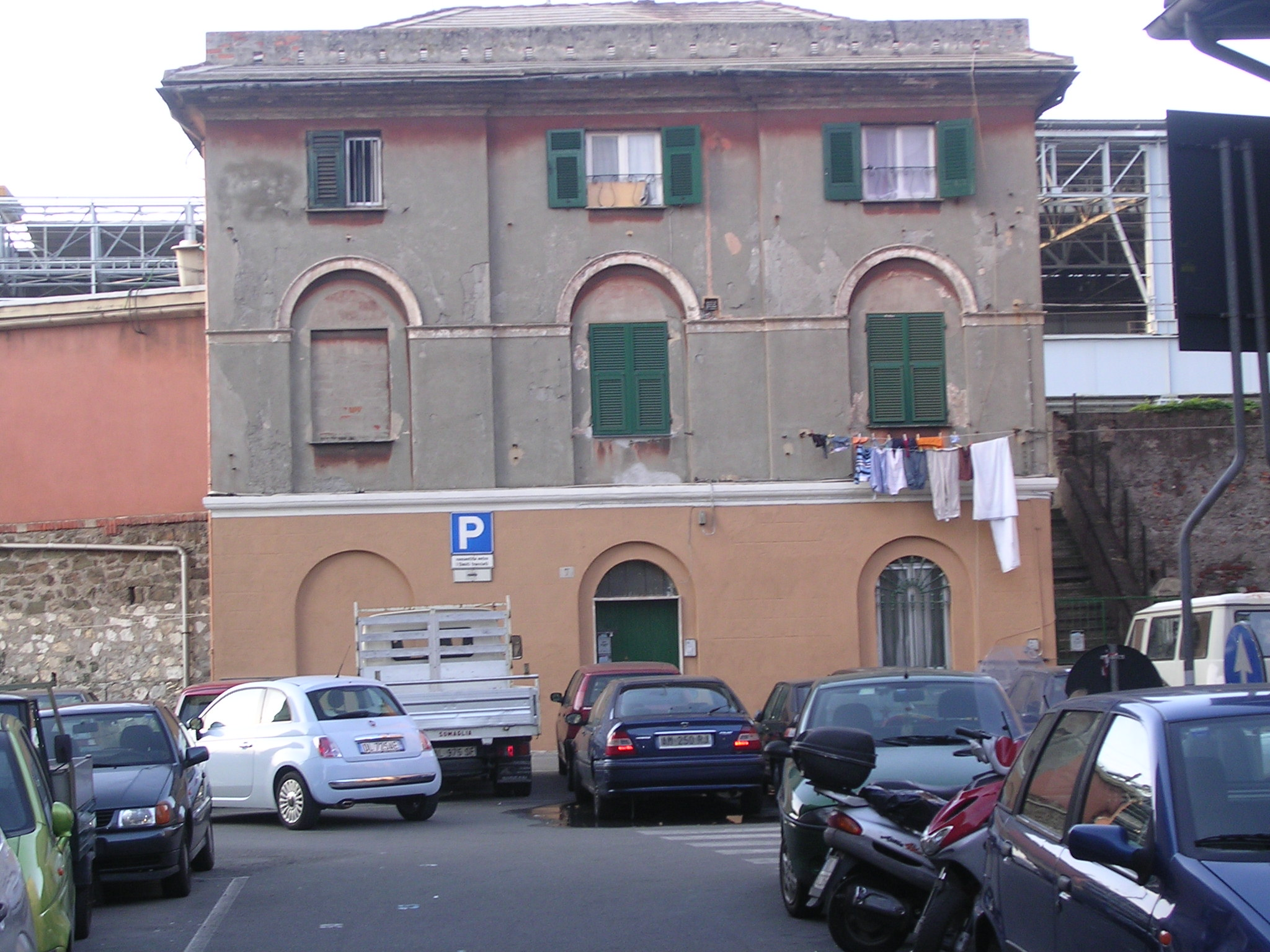 La vecchia stazione di Genova Cornigliano, situata in piazza Battelli, ora adibita ad abitazione privata.